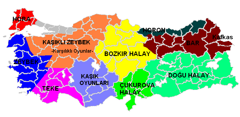 kendim ürettim. Önceki versiyon tamir edildi. Bakınız